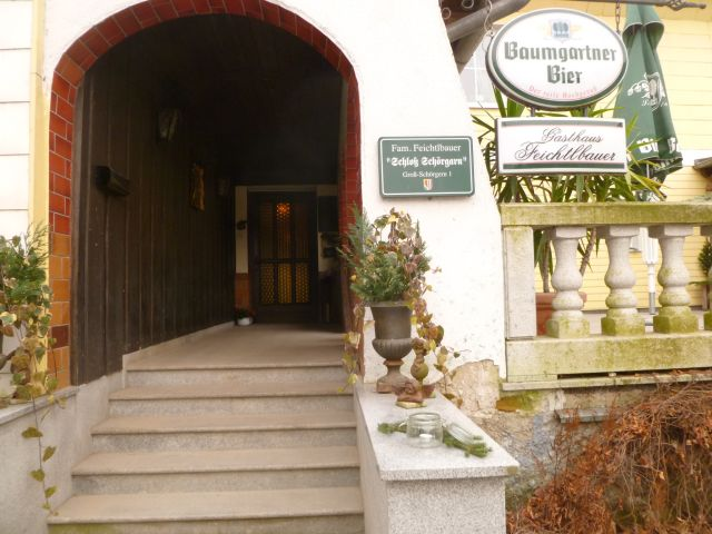 Schloss Schörgern Eingang